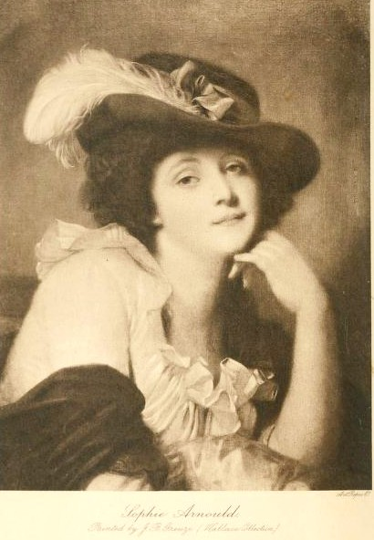 Sophie Arnould, gemalt von Jean-Baptiste Greuze Photogravure after the painting by Greuze in the Wallace Collection at Hertford House